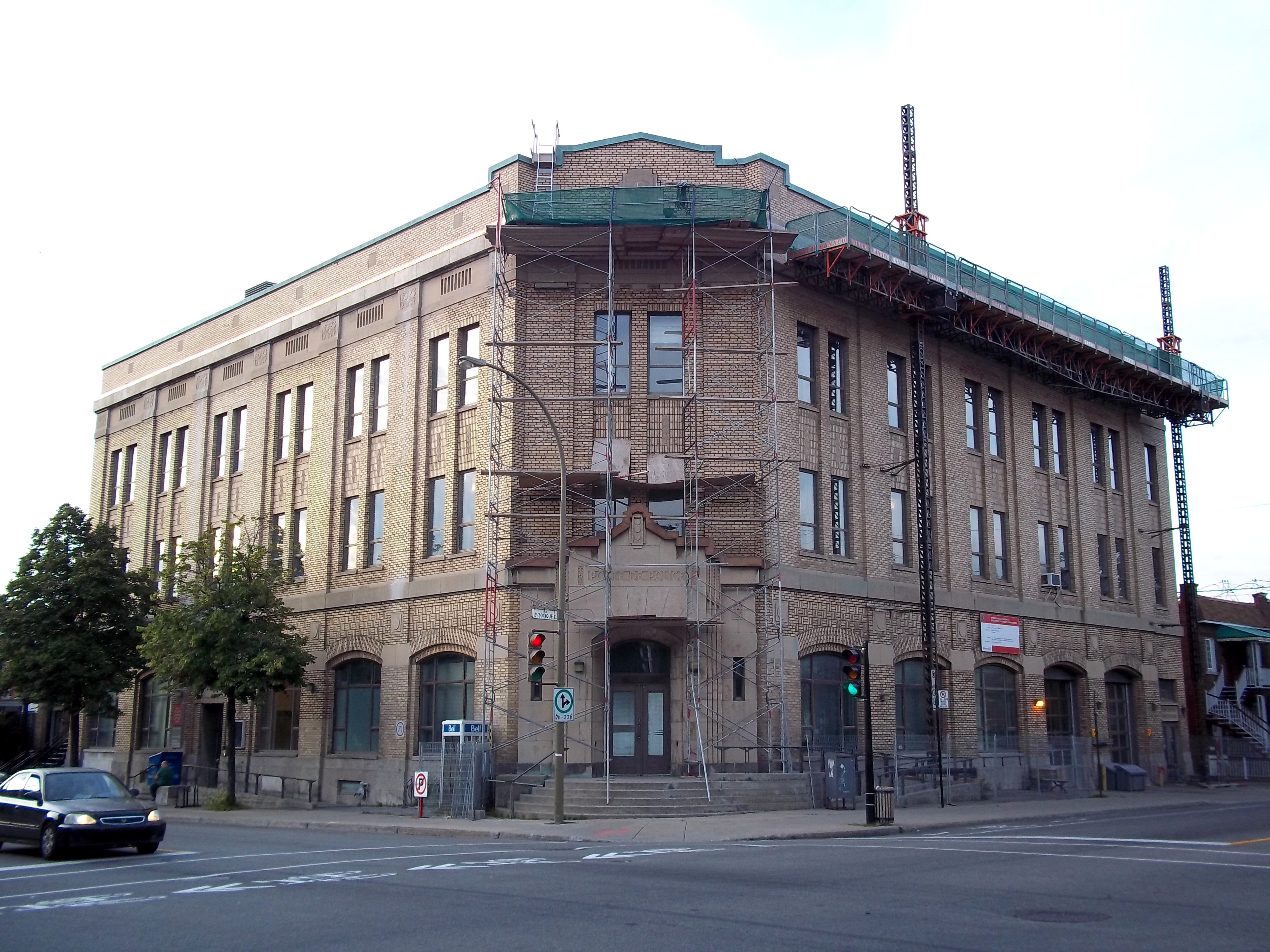 Bibliothèque La Petite-Patrie, 6707, avenue De Lorimier, Montréal